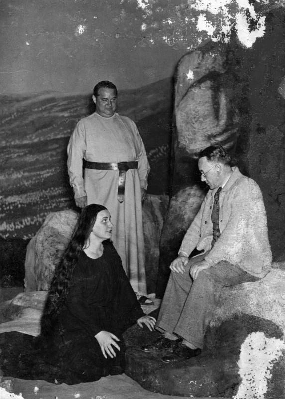 Bayreuth, Martha Fuchs, Tietjen, Andresen Bayreuther Festspiele 1936 Tietjen bei einer Besprechung mit Martha Fuchs (Kundry) und Ivar Andresen (Gurnemanz) bei der Probe des Parsival. Fot.: Naumann 9919-36 ADN-Text: ADN-ZB/Archiv Deutschland, Juli 1936: In Bayreuth haben die Proben zu Wagners "Parsifal" begonnen. Heinz Tietjen, der künstlerische Leiter der Bayreuther Festspiele, bei einer Besprechung mit der Sopranistin Martha Fuchs als Kundry und dem Bassisten Ivar Andresen als Gurnemanz. Aufn. Naumann 9919-36 Abgebildete Personen: Fuchs, Martha: Sopranistin an der Staatsoper Unter den Linden Berlin, Deutschland Tietjen, Heinz: Intendant der Hamburger Staatsoper, Preußisches Staatstheater Berlin, Bundesrepublik Deutschland Andresen, Ivar: Opernsänger, Deutschland